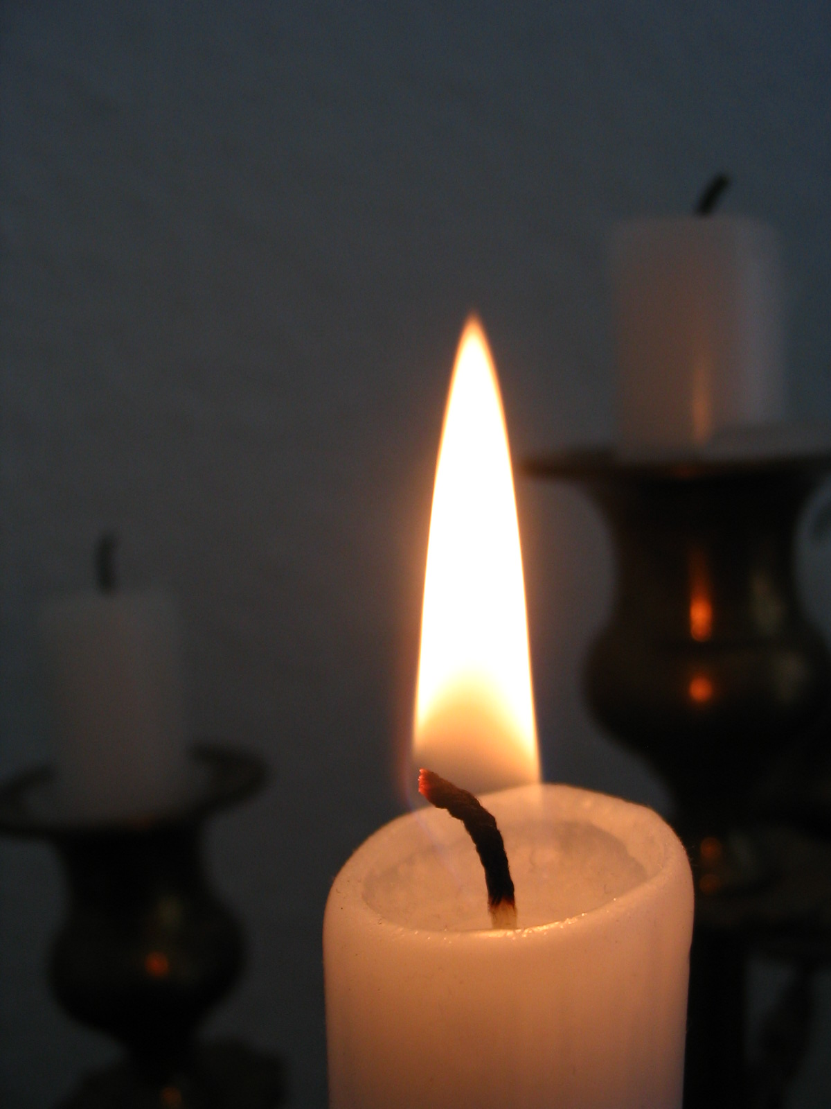 Candle flame